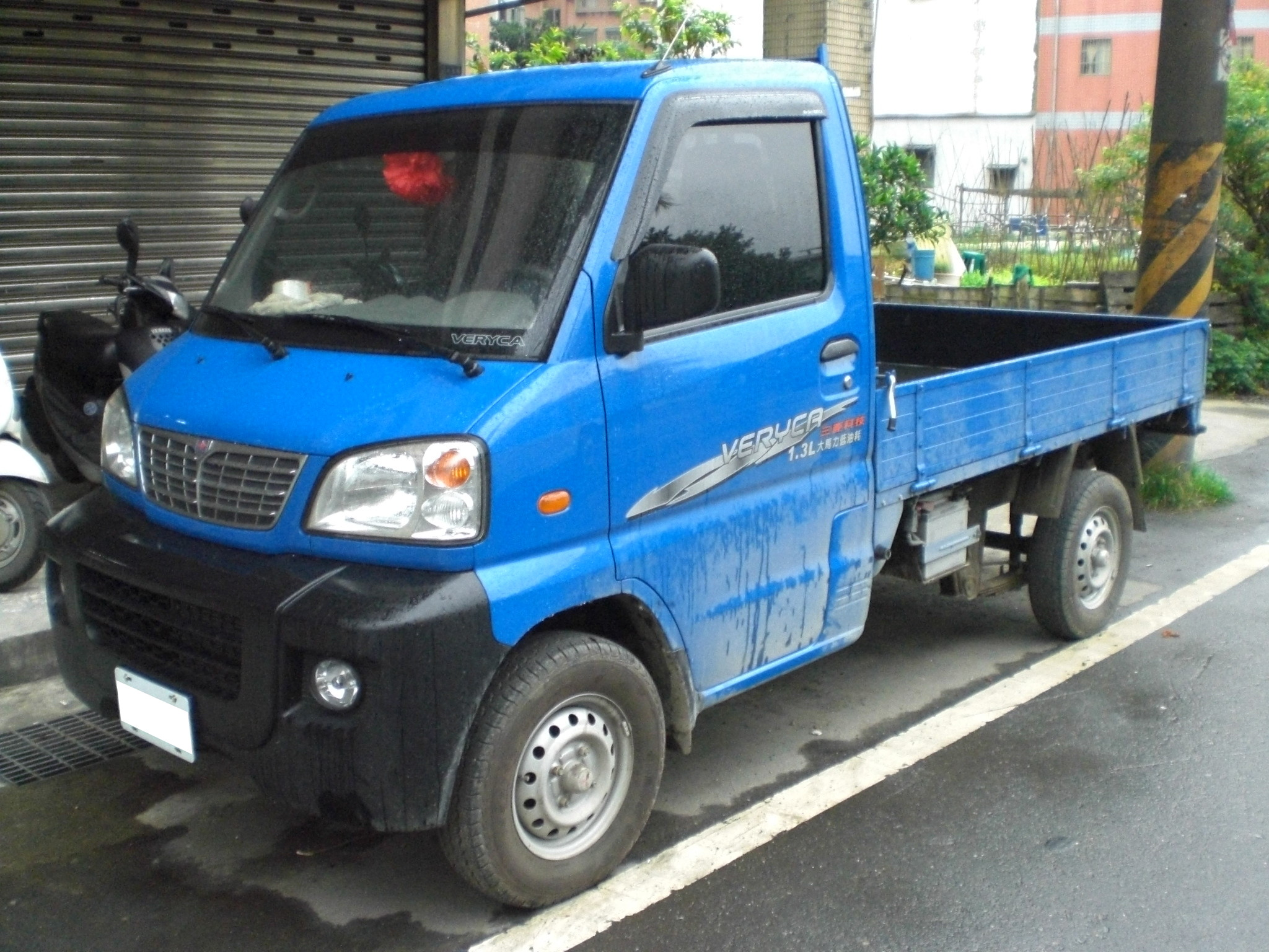 中華菱利1.3L小貨車左前方外觀